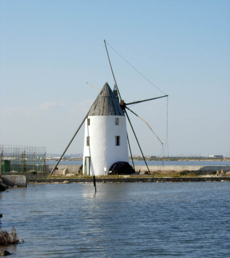 Molino de la Ezequiela en el parque natural de San Pedro del Pinatar